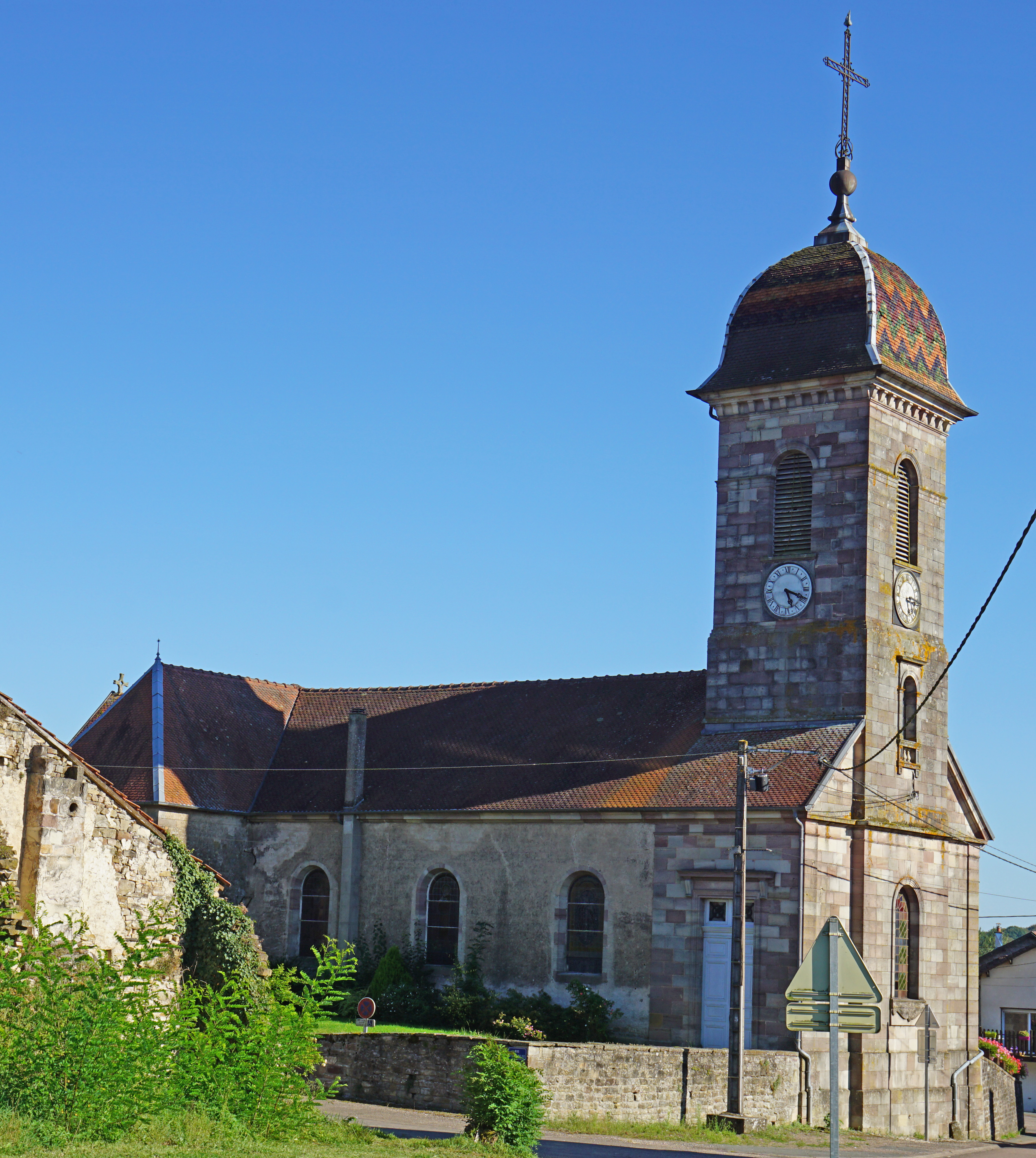 L'église de Briaucourt en Haute-Saône.